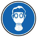 Pictogramme "Obligation du port de dispositif de protection des voies respiratoires"